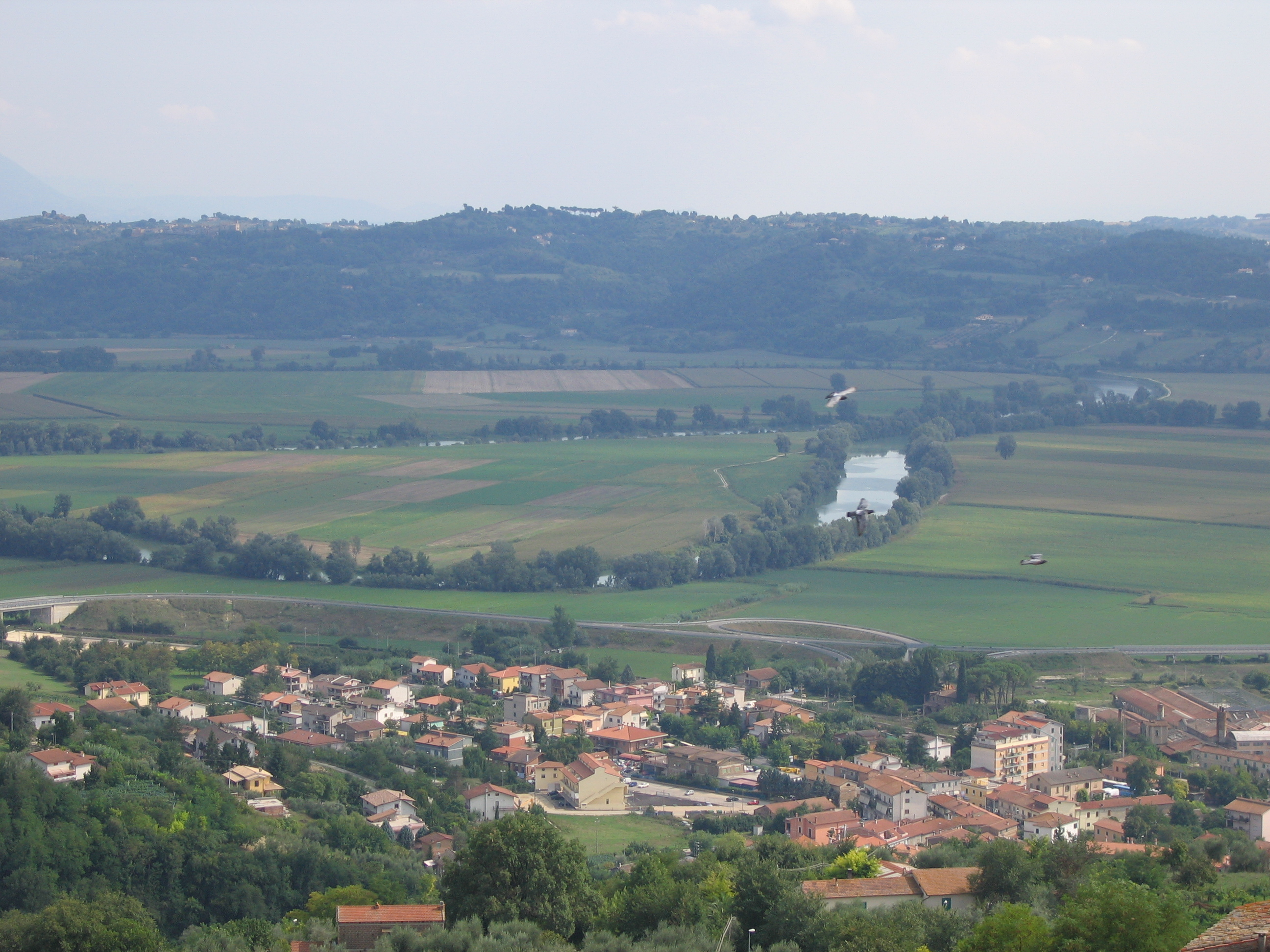 panorama stimigliano scalo